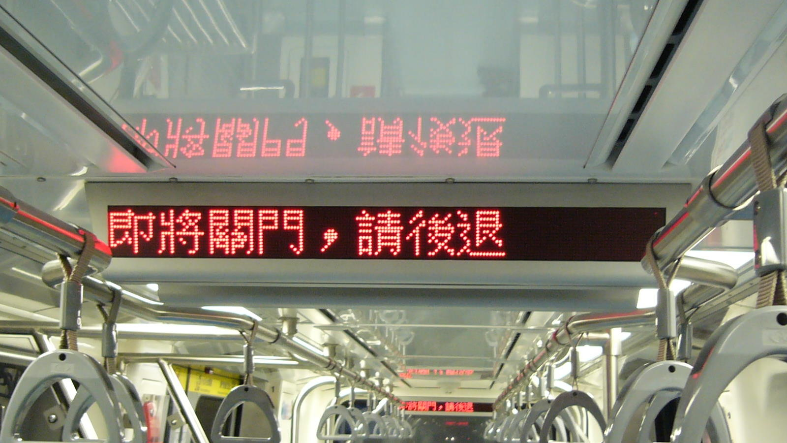 龐巴迪CITYFLO650型自動列車行控系統電聯車內的LED行車資訊顯示器